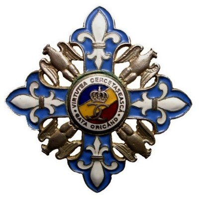 varianta interbelica, Carol al II-lea, colectia Iulian Lipovanu